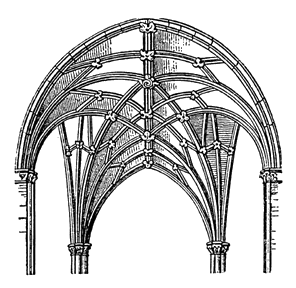 Netzgewölbe.